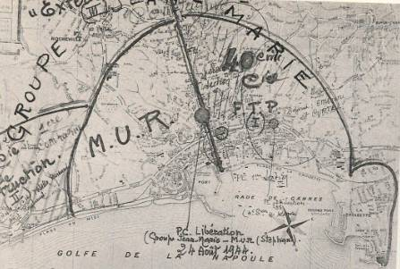 Plan de bataille pour la libération de Cannes établi par Ange-Marie Miniconi en personne